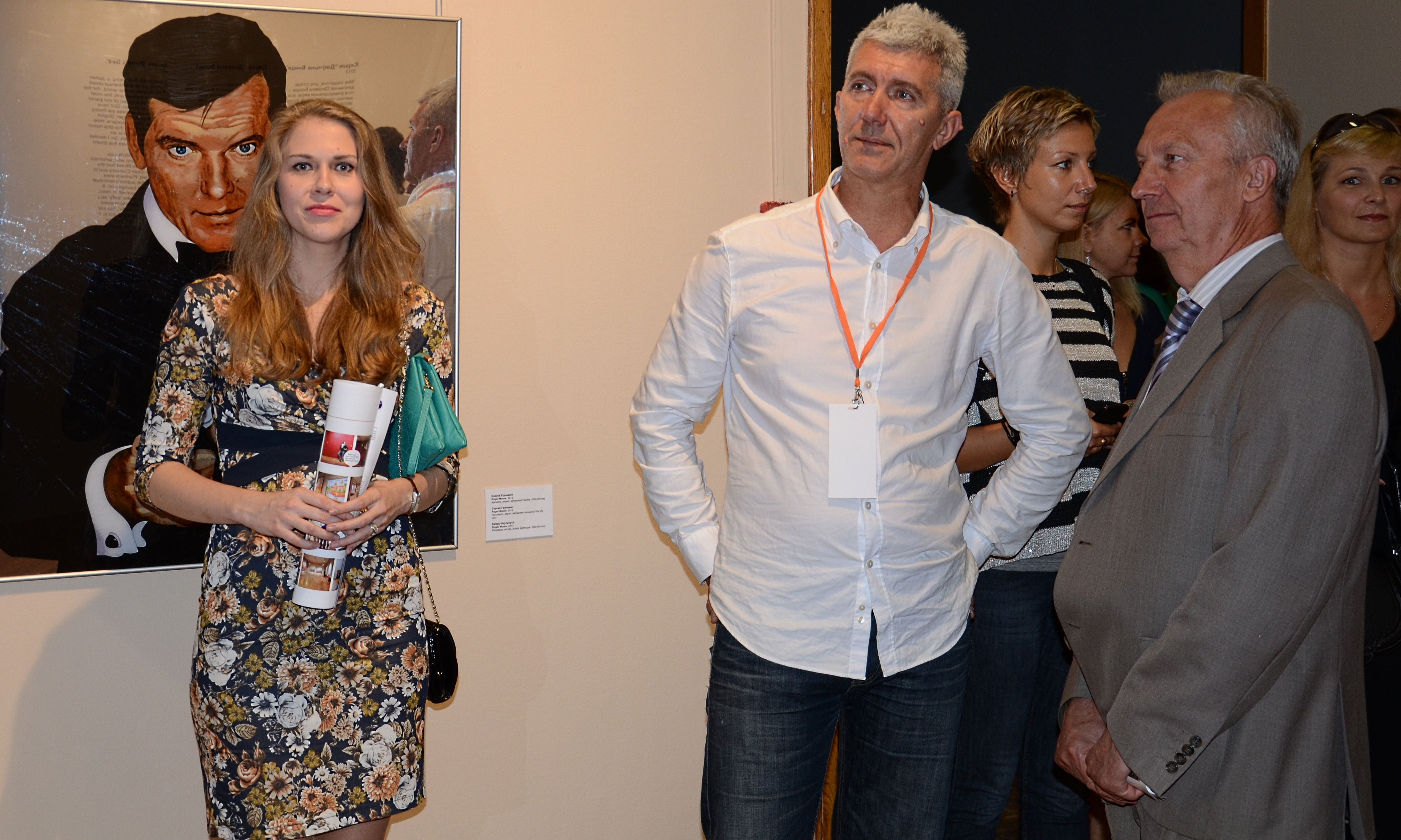 Открытие проекта "Арт-Забор" в Национальном художественном музее Беларуси 8 сентября 2014 года